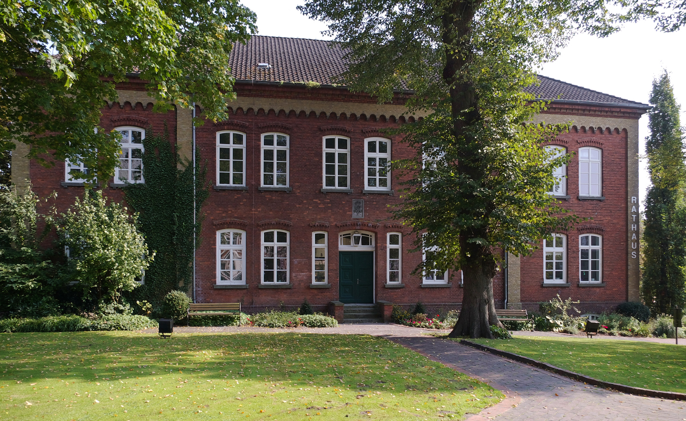 altes Rathaus in Weener